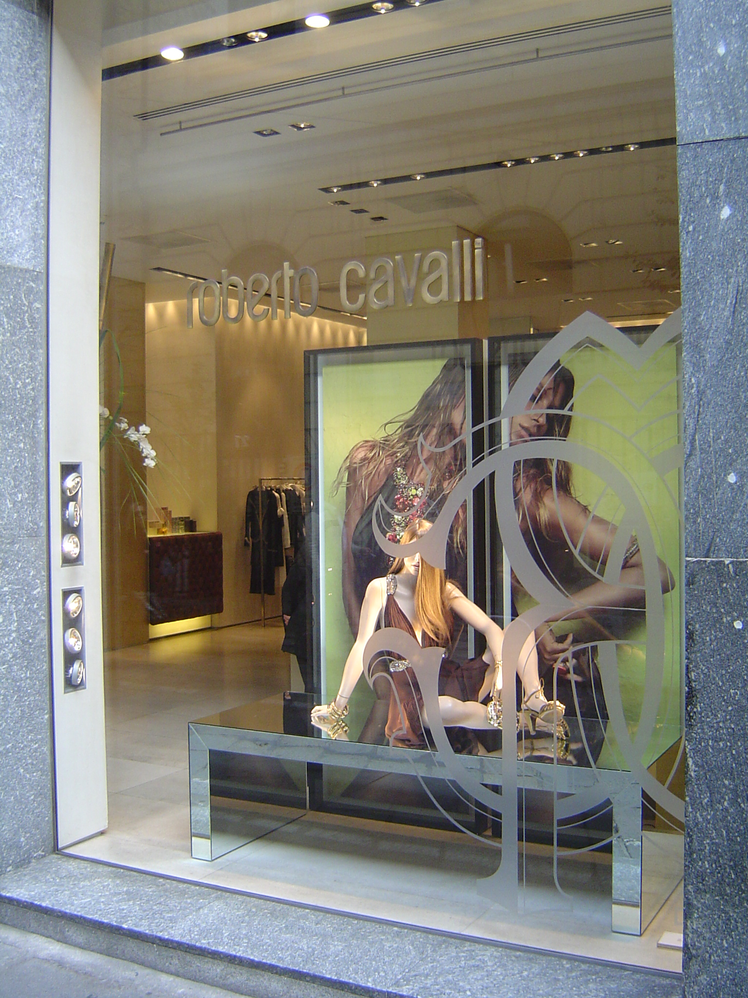 The Roberto Cavalli shop in Via della Spiga, Milan